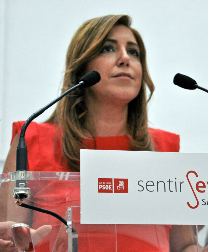 Presentación de la candidatura de Susana Díaz a la Secretaría General provincial del PSOE en Sevilla, celebrada el 3 de julio de 2012 en la sede provincial del partido en la calle Luis Montoto de la capital hispalense.